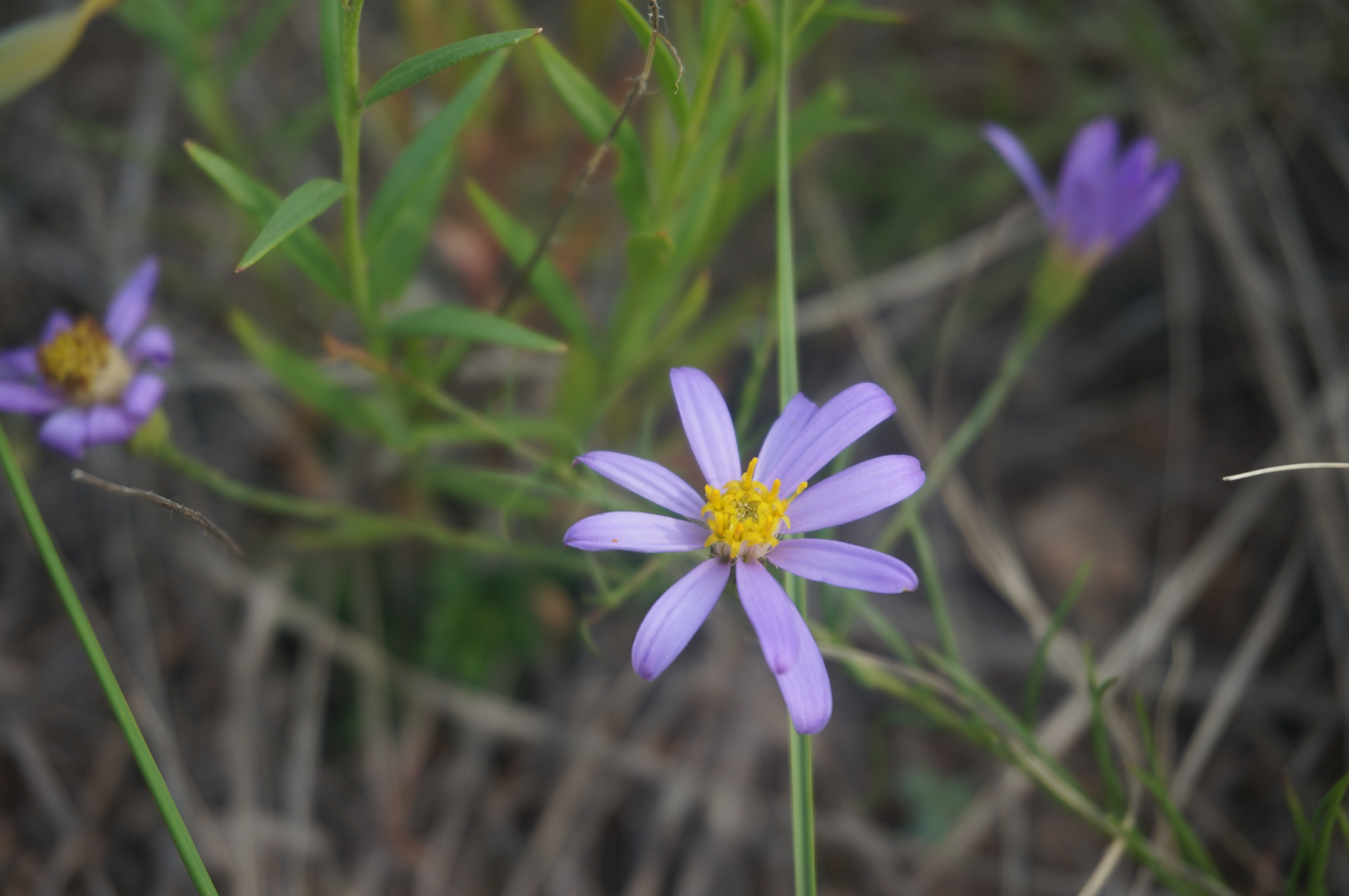 Солонечник узколистный в период цветения Серноводный шихан, Самарская область, Россия